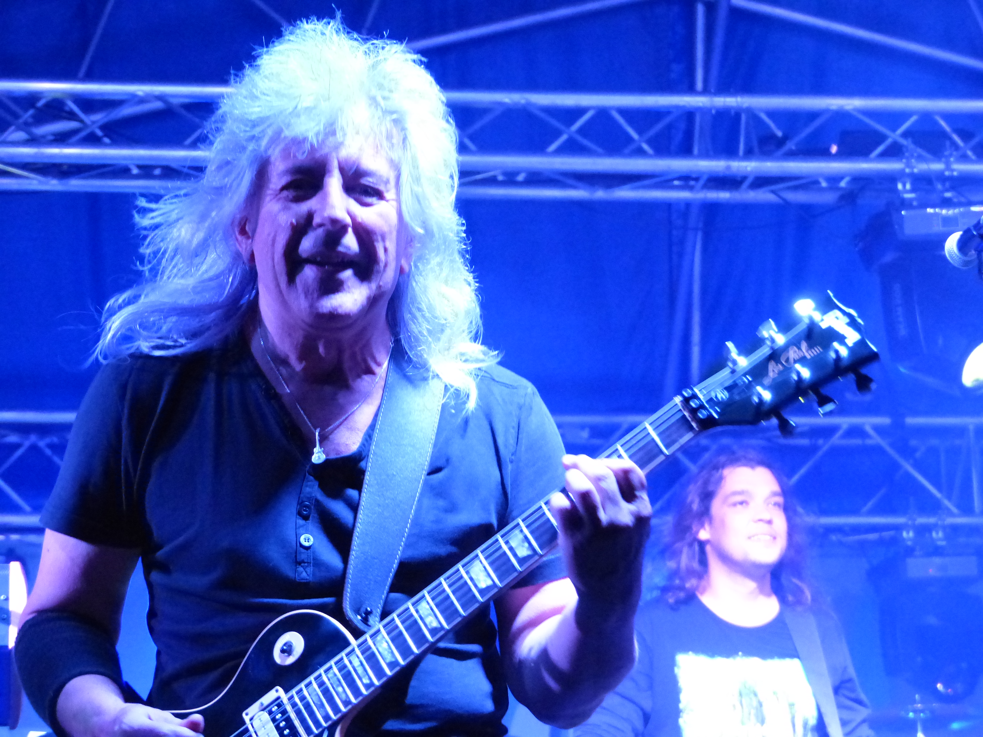 A felvétel 2017. június 30-án készült a Balaton Fesztiválon. Lord együttes.